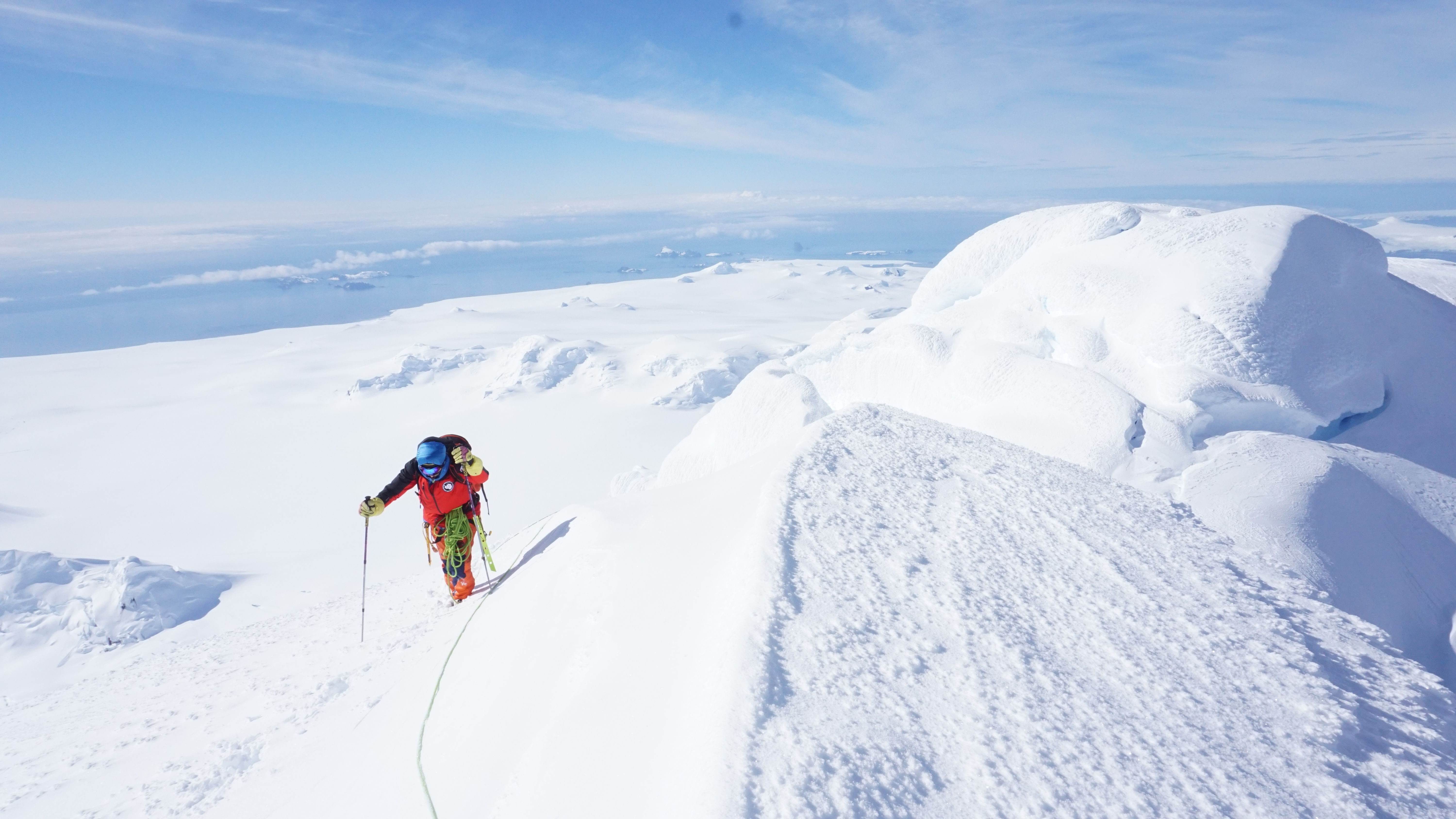 Николай Петков при първото изкачване на връх Св. Борис